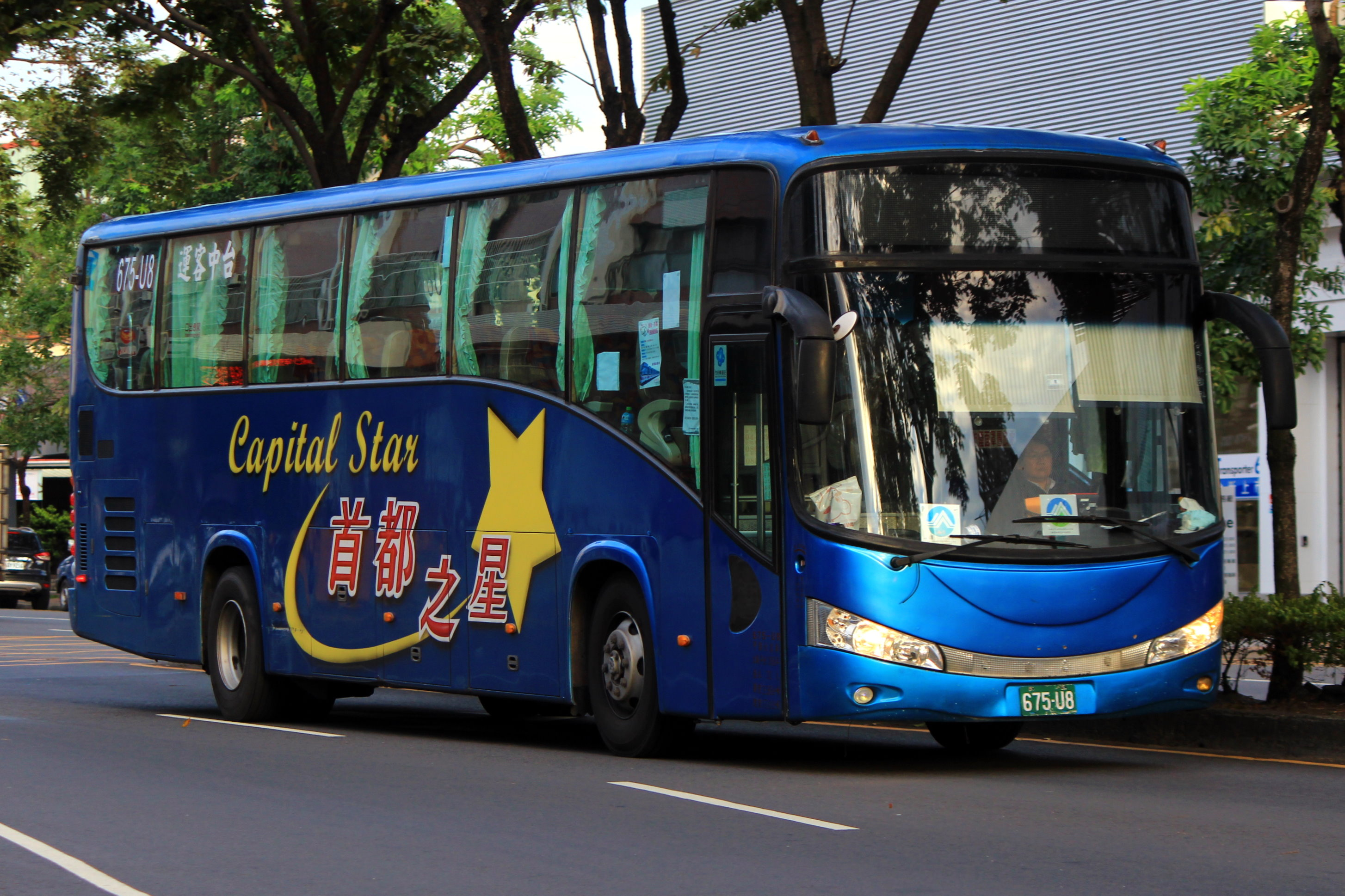 中文（台灣）: 首都之星 勤工派出所